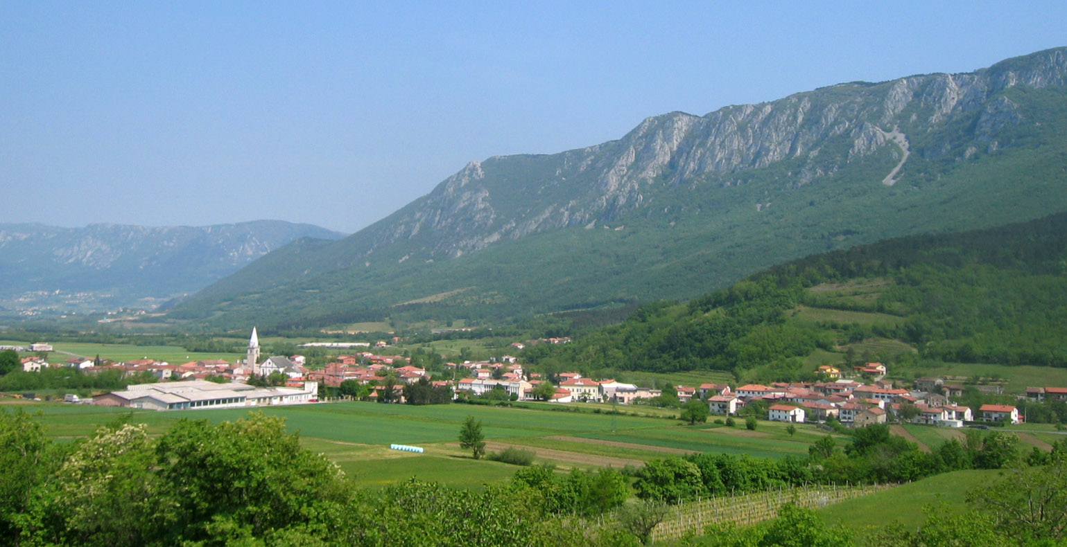 Podnanos, town in Slovenia